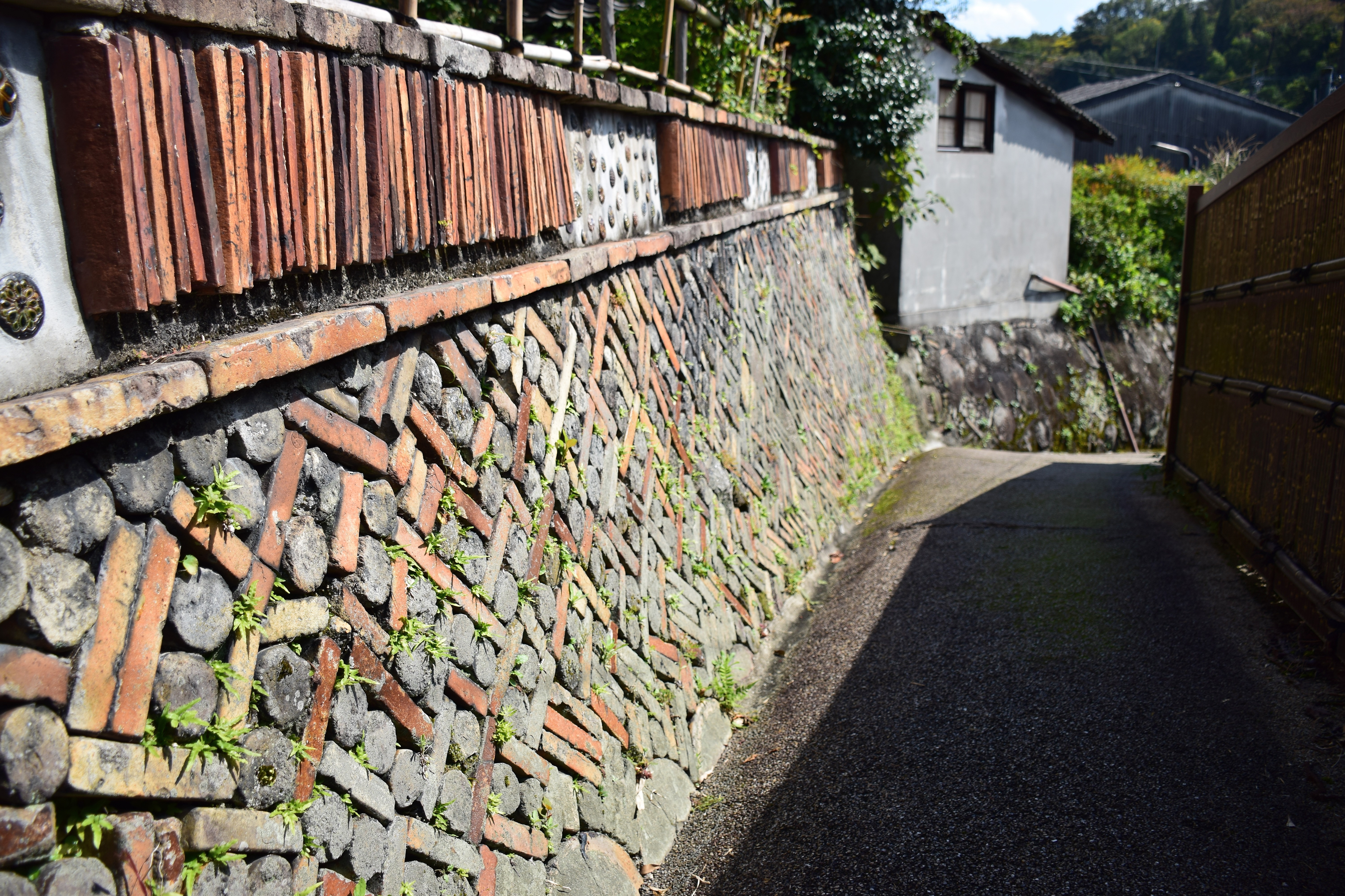 窯垣の小径